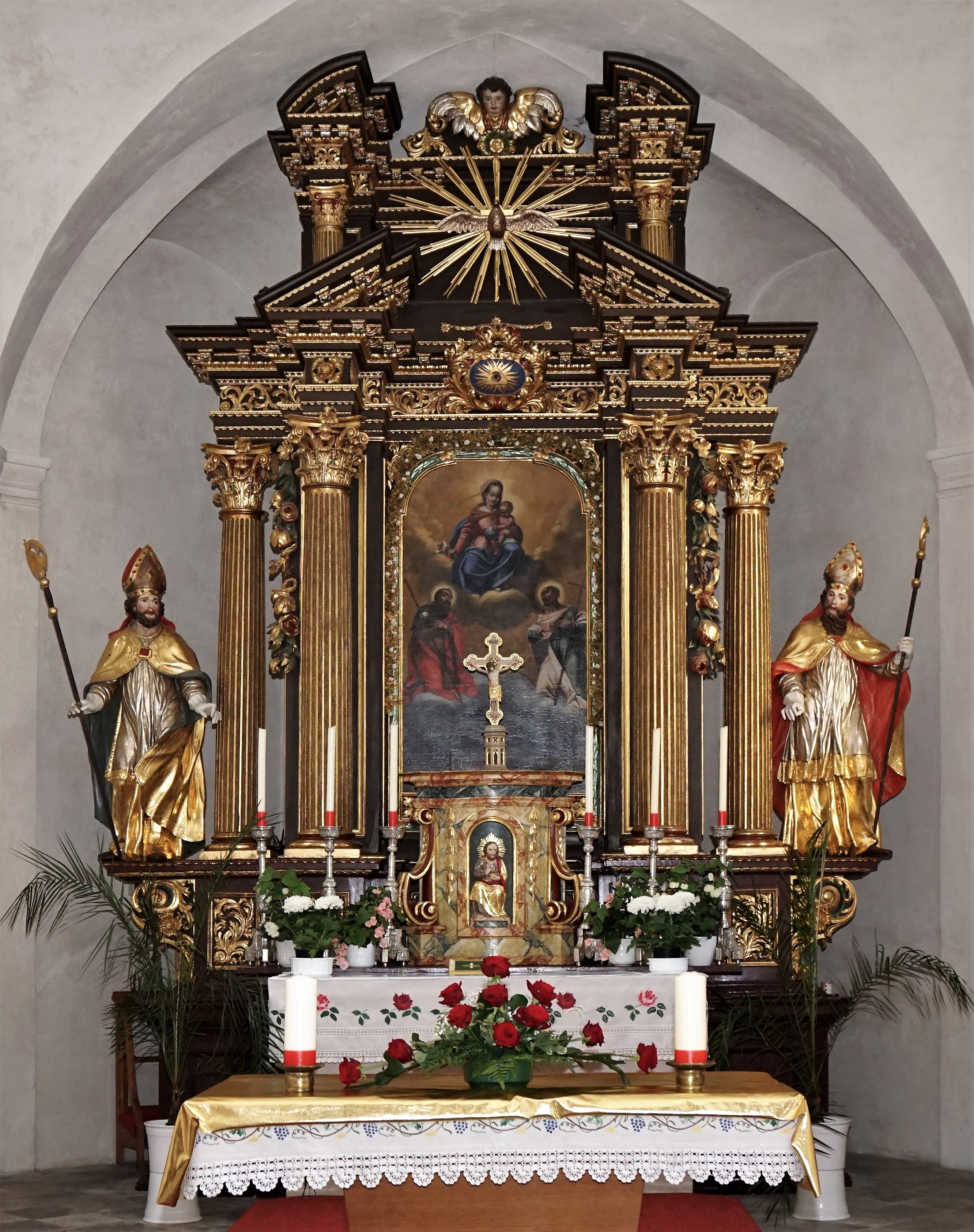 Kath. Pfarrkirche St. Philipp und St.Jakob (Arriach), der barocke Hochaltar